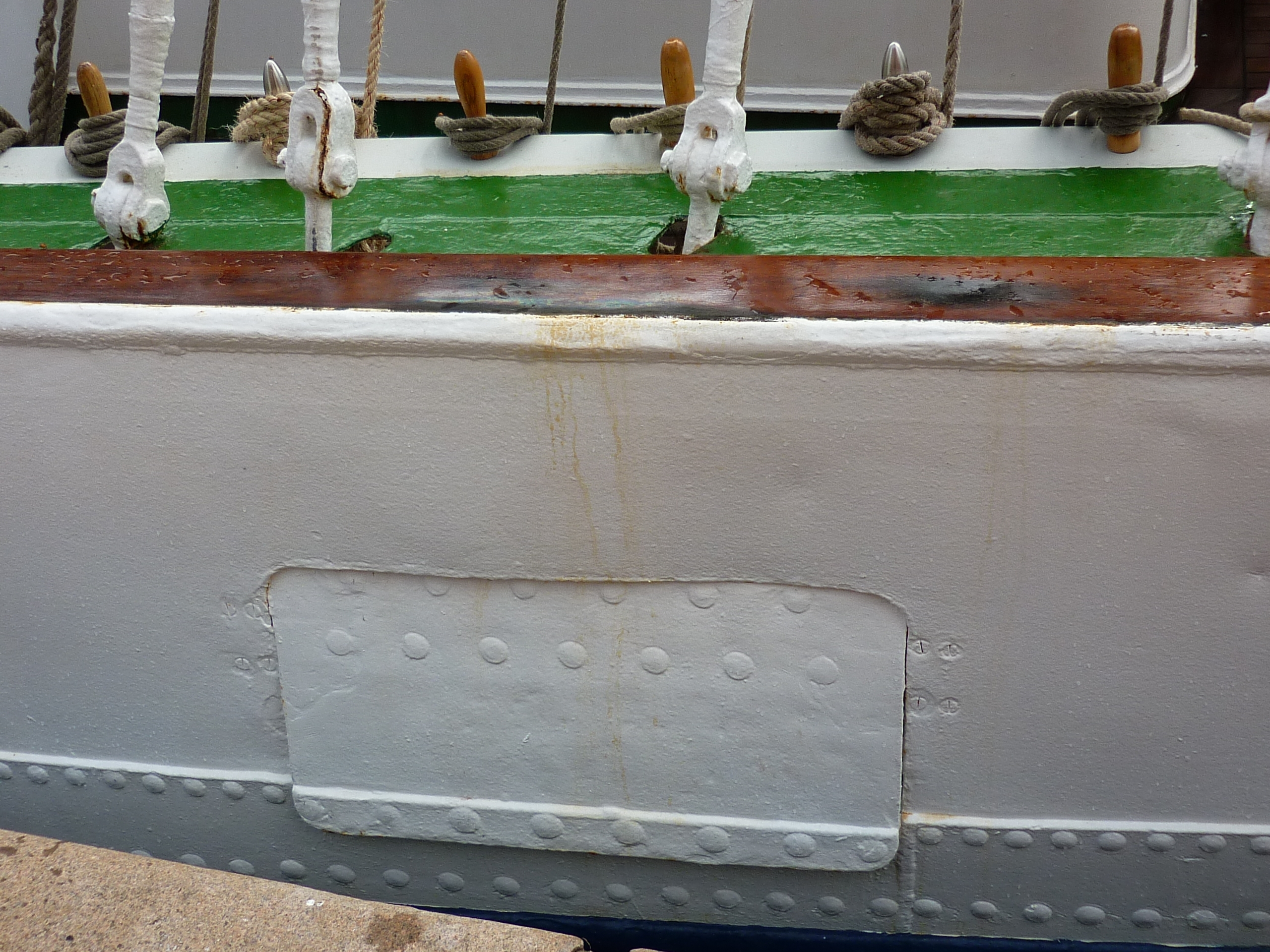 Speigatt (SSS Greif)